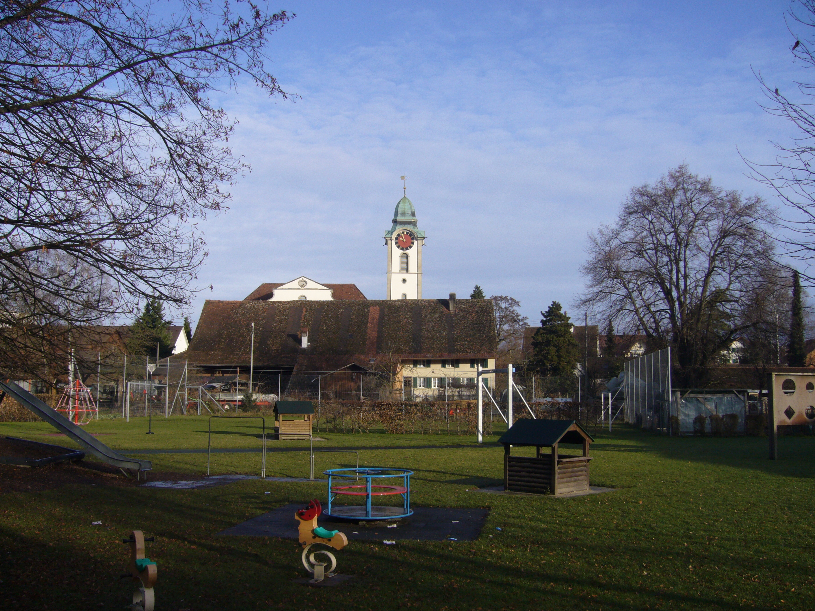 Blick vom Altbache auf Bauernhaus bei der reformirten Kirche; im Vordergrunde ein Spielplatz.